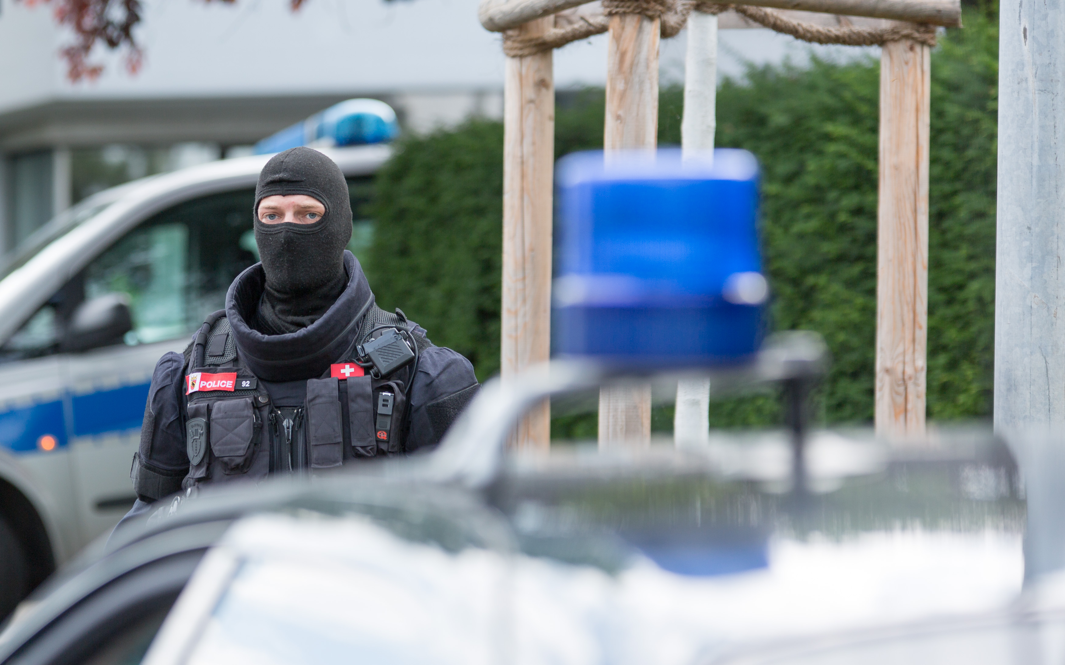 Ein Polizist der Spezialeinheut Enzian aus Bern (CH)